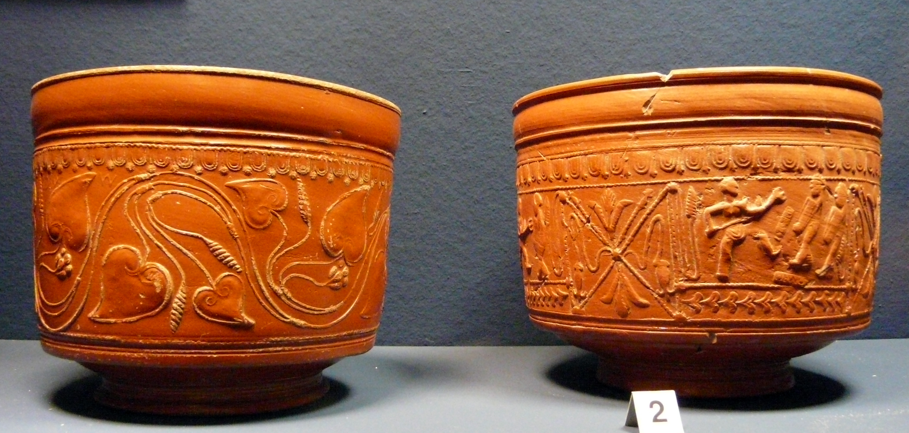 Südgallische Terra Sigillata der Form „Dragendorff 30“ (Anfang 1. Jh.) aus dem Museumszentrum Burg Linn; Fundort: Asciburgium